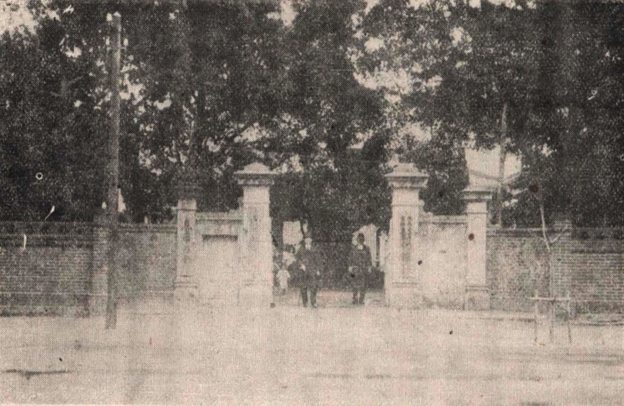 中文（台灣）: 彰化銀行台中本店